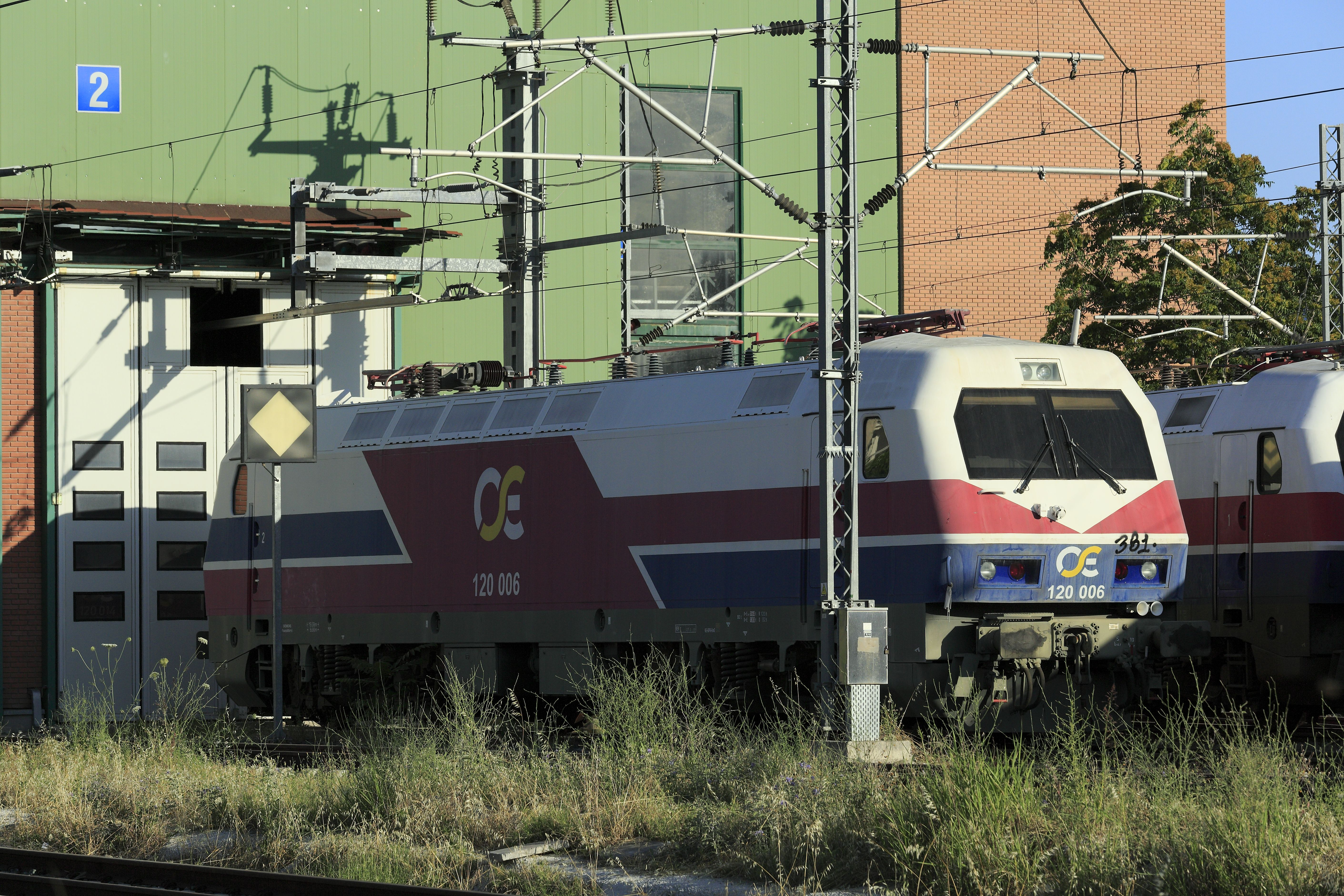 Unmittelbar vor dem Ellokschuppen, die Maschine macht einen betriebsfähigen Eindruck.